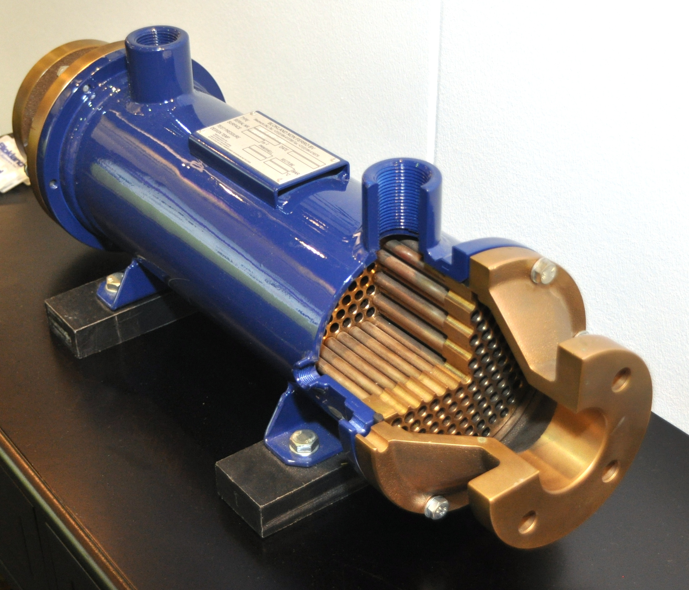 Blokland central heating heat exchanger type WW 140-100